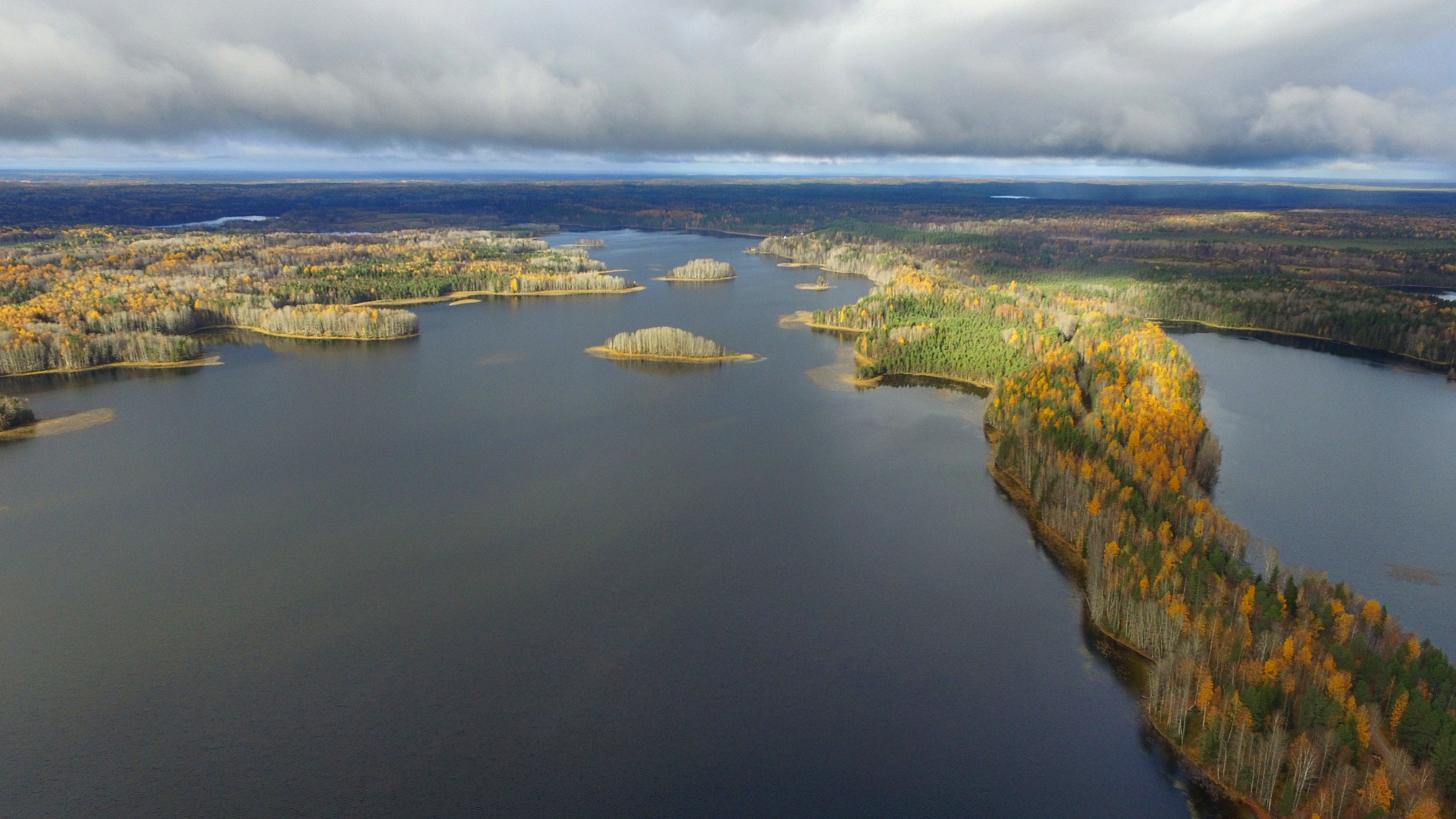 Озовая гряда (Масельга) — фрагмент водораздела Ледовитого и Атлантического океанов